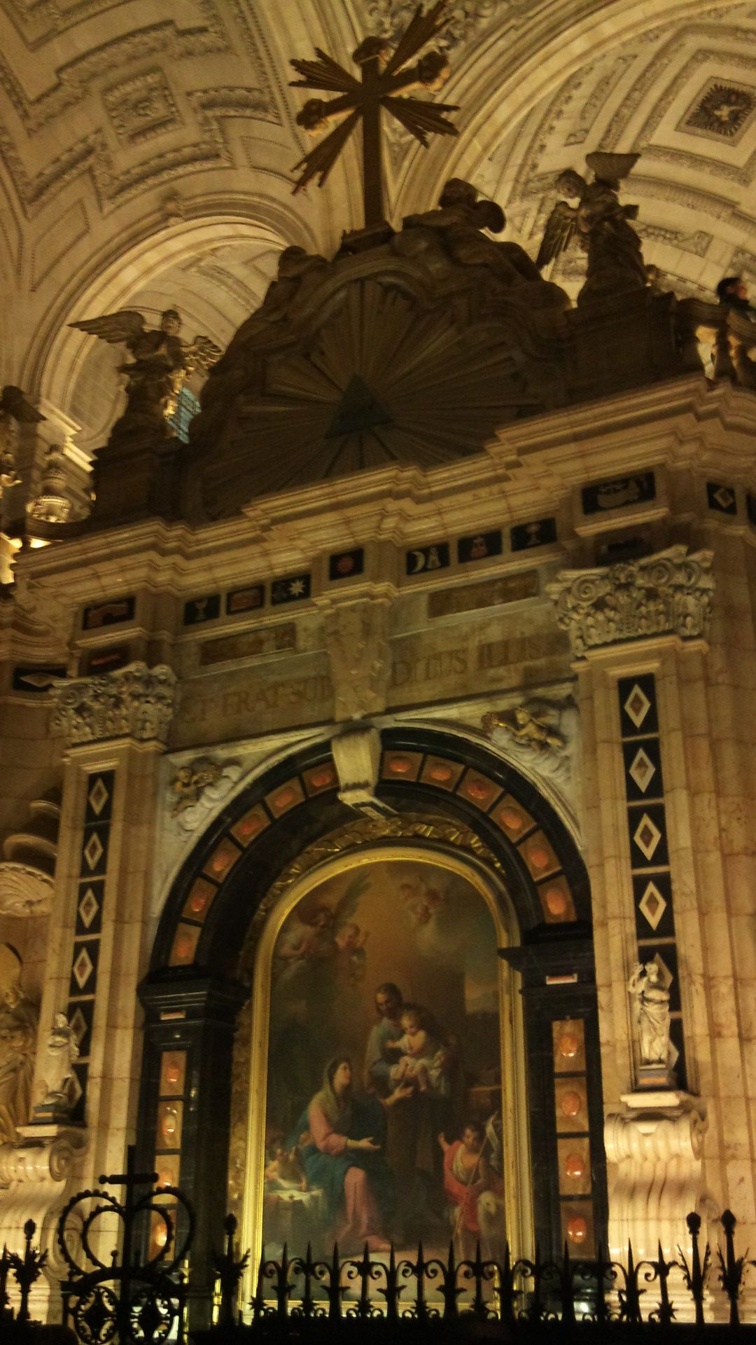 Vista central del trascoro de la Catedral de la Asunción de la Virgen de Jaén. Se observa el cuadro de la Sagrada Familia obra de Mariano Salvador Maella en 1793.